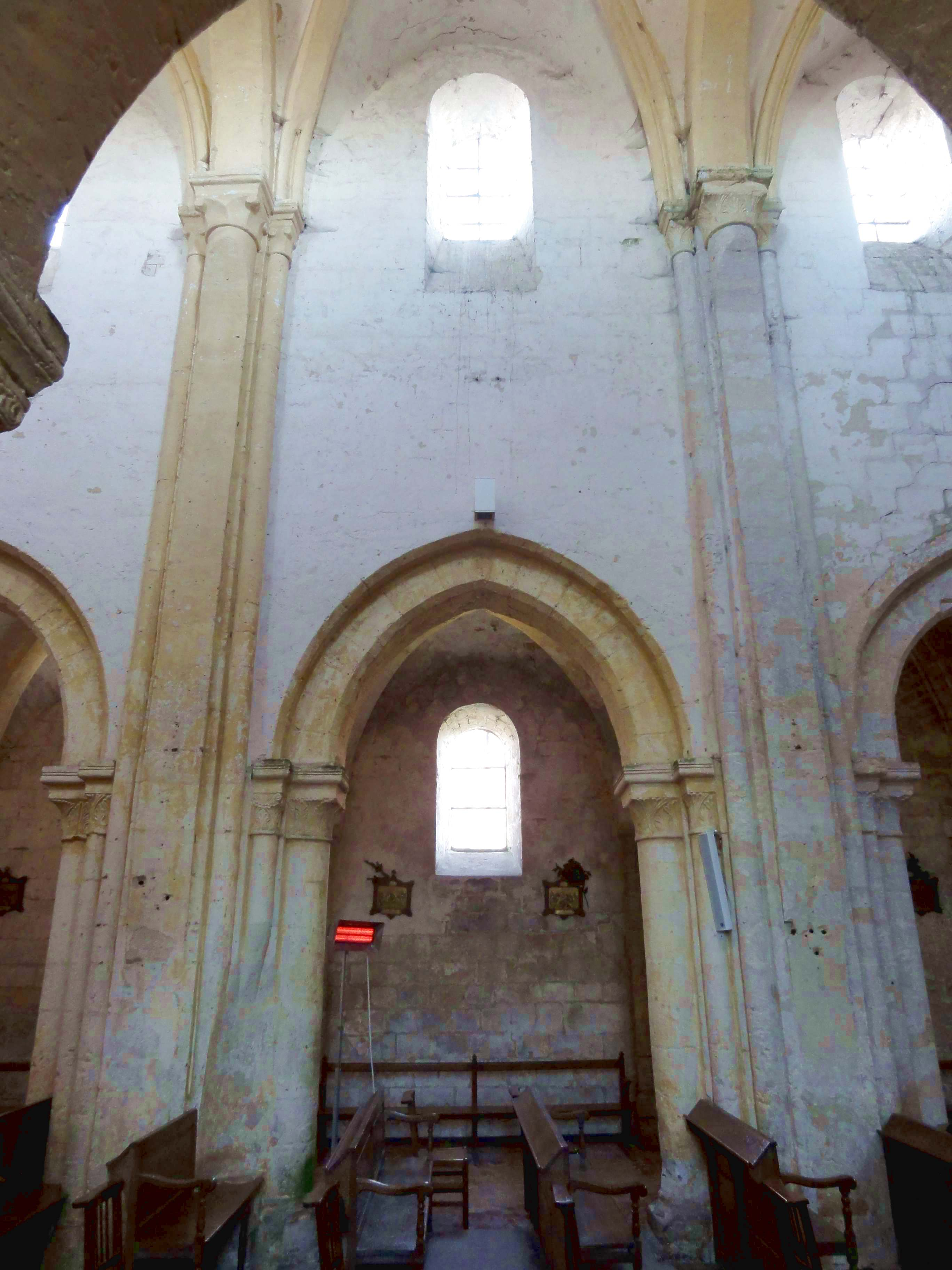 Intérieur de l'église - voir titre.